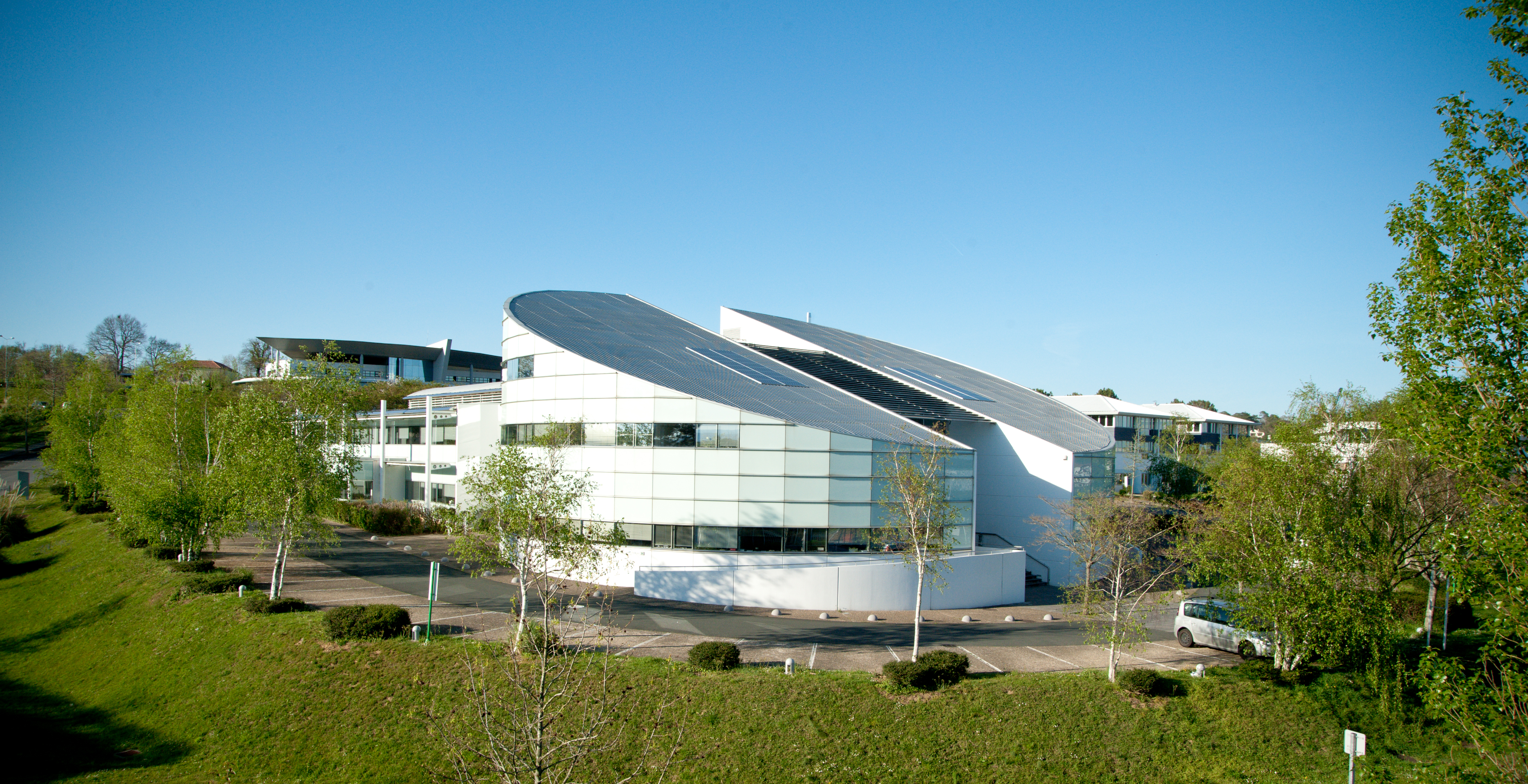 General view of ESTIA 1.